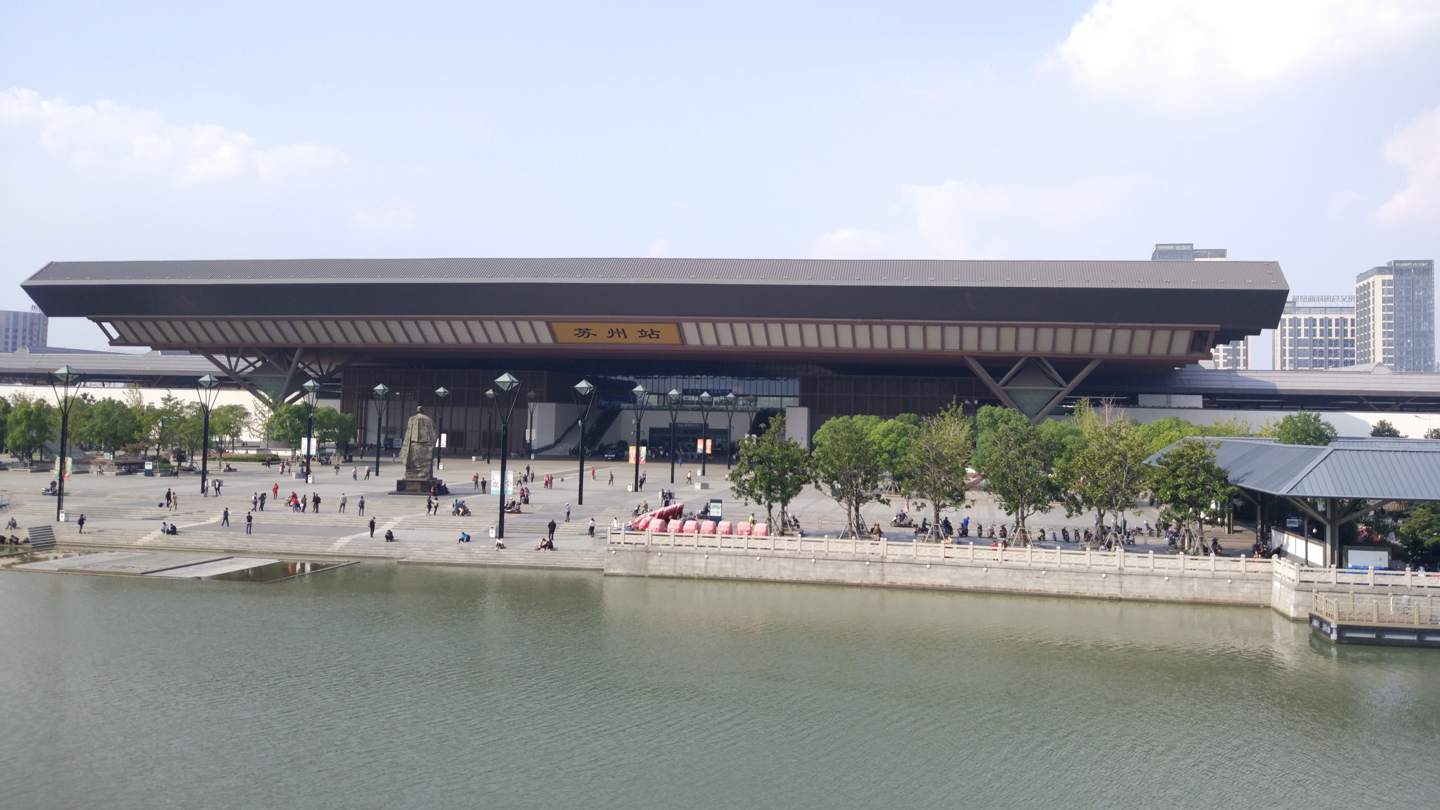 苏州站北广场